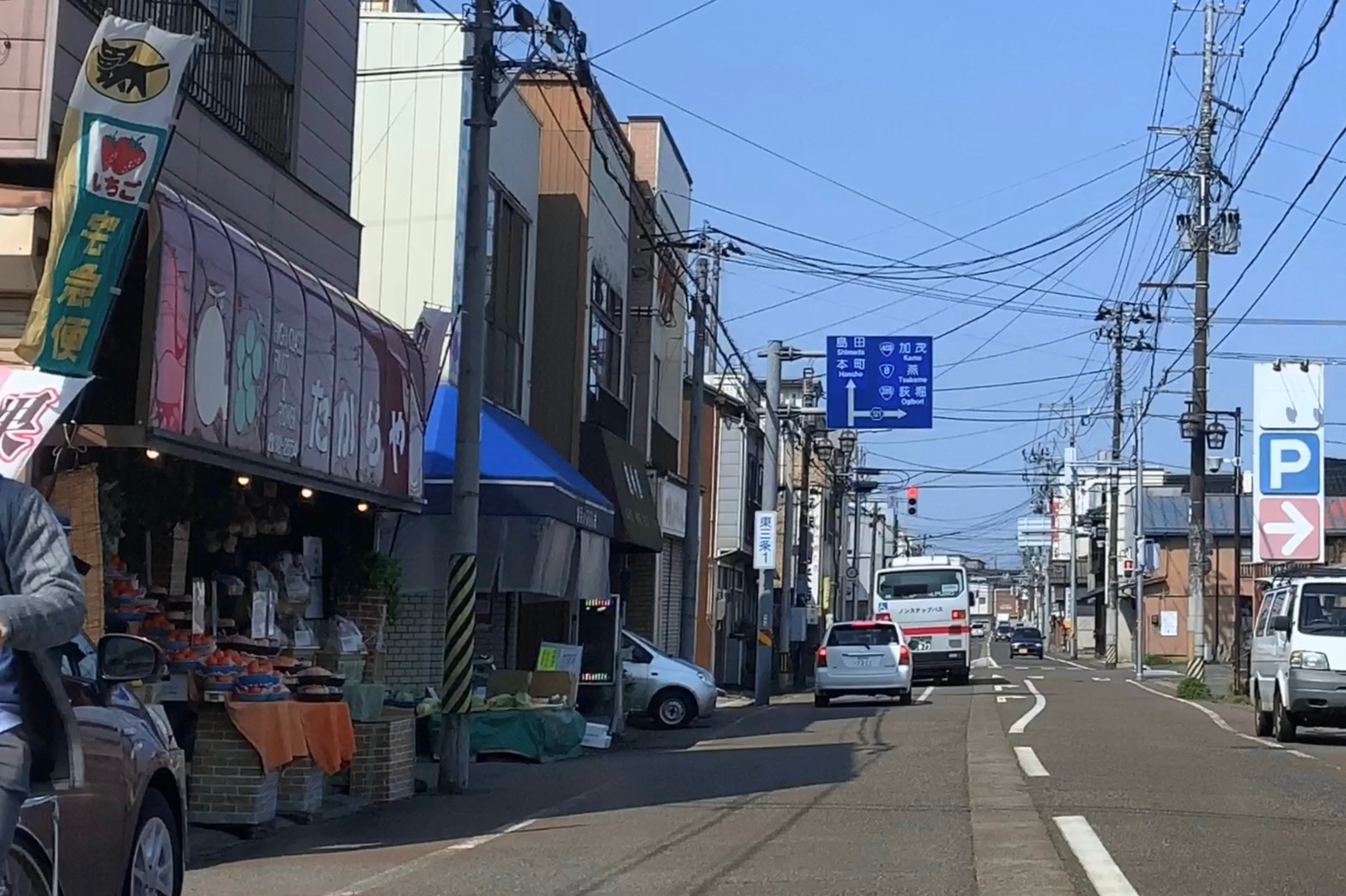 三条市の東三条商店街（2020年4月）新潟県道121号東三条停車場線